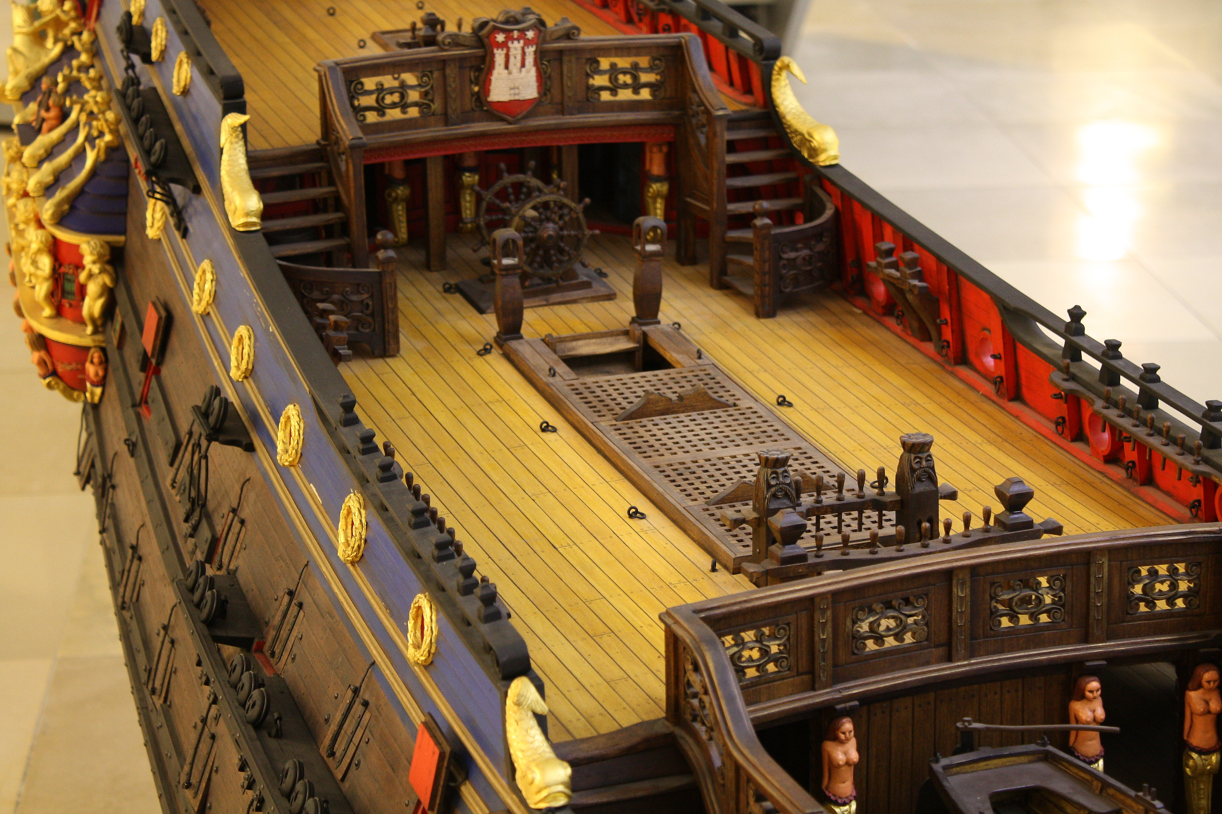 Modell des hamburgischen Konvoyschiffes Wapen von Hamburg (II) - Kampanjedeck